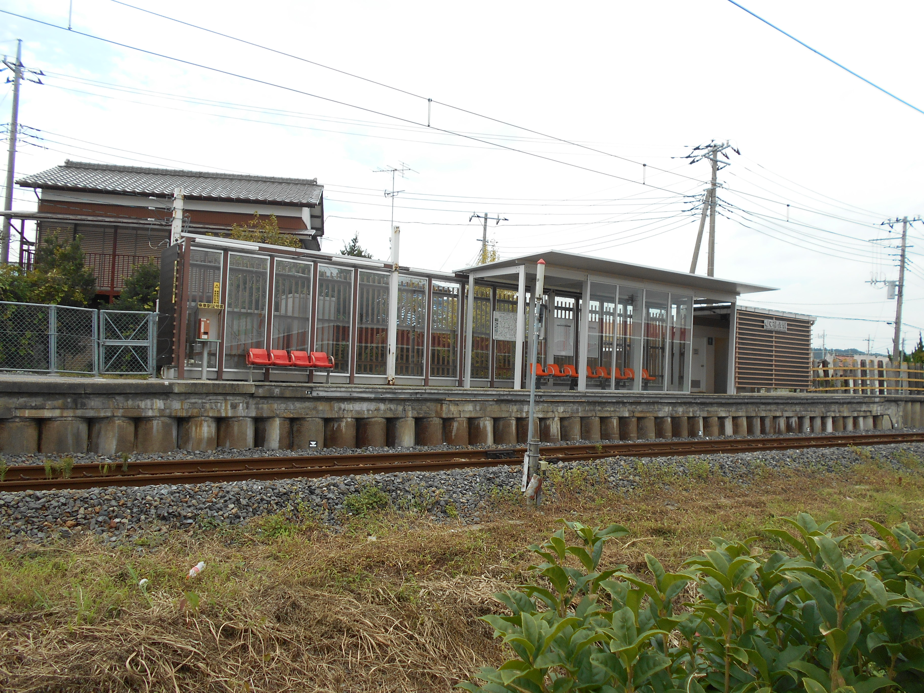 ＪＲ東日本 福俵駅